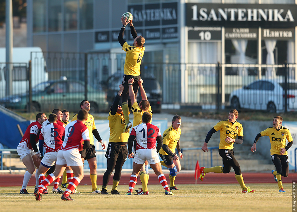 Олимп - Кредо. Ответный матч финальной серии 2014 года. Регби-15. "Олимп" - десятикратный чемпион Украины по регби-15!